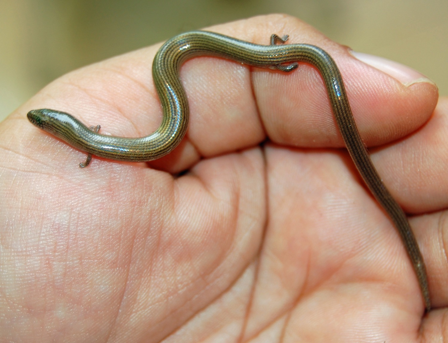 Lygosoma quadrupes. From Darmaga, Bogor, West Java, Indonesia